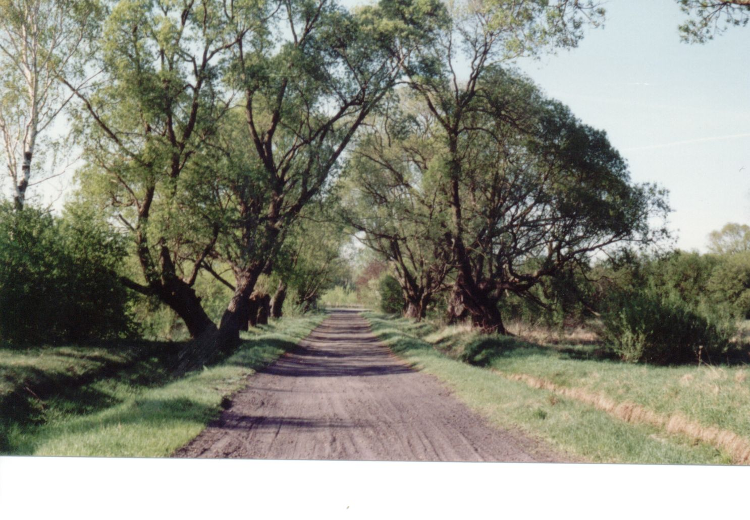 Stara aleja wysadzana wierzbami we wsi Raducz